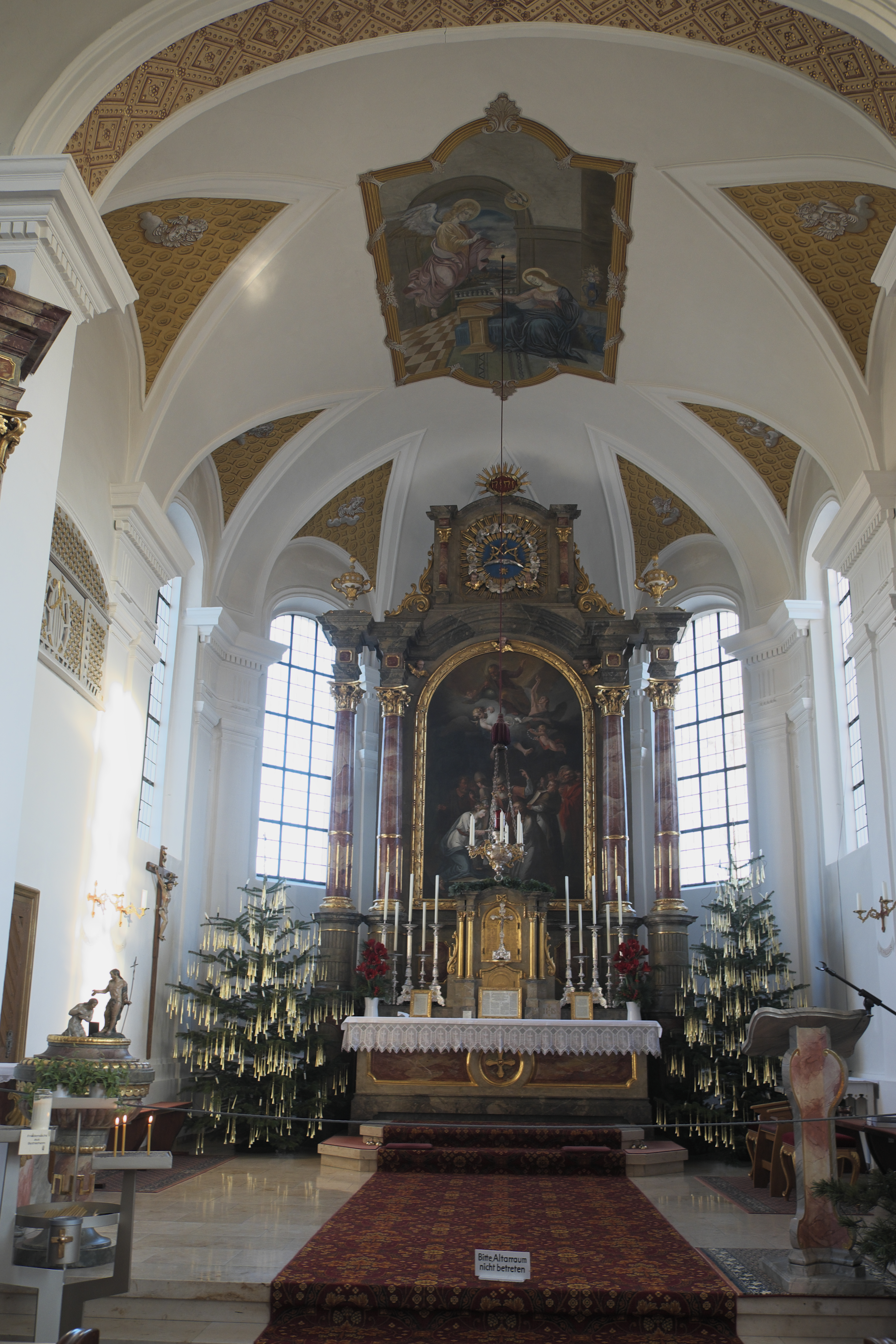 Katholische Pfarrkirche Mariä Himmelfahrt in Klingen (Aichach) im schwäbischen Landkreis Aichach-Friedberg (Bayern/Deutschland), Chor